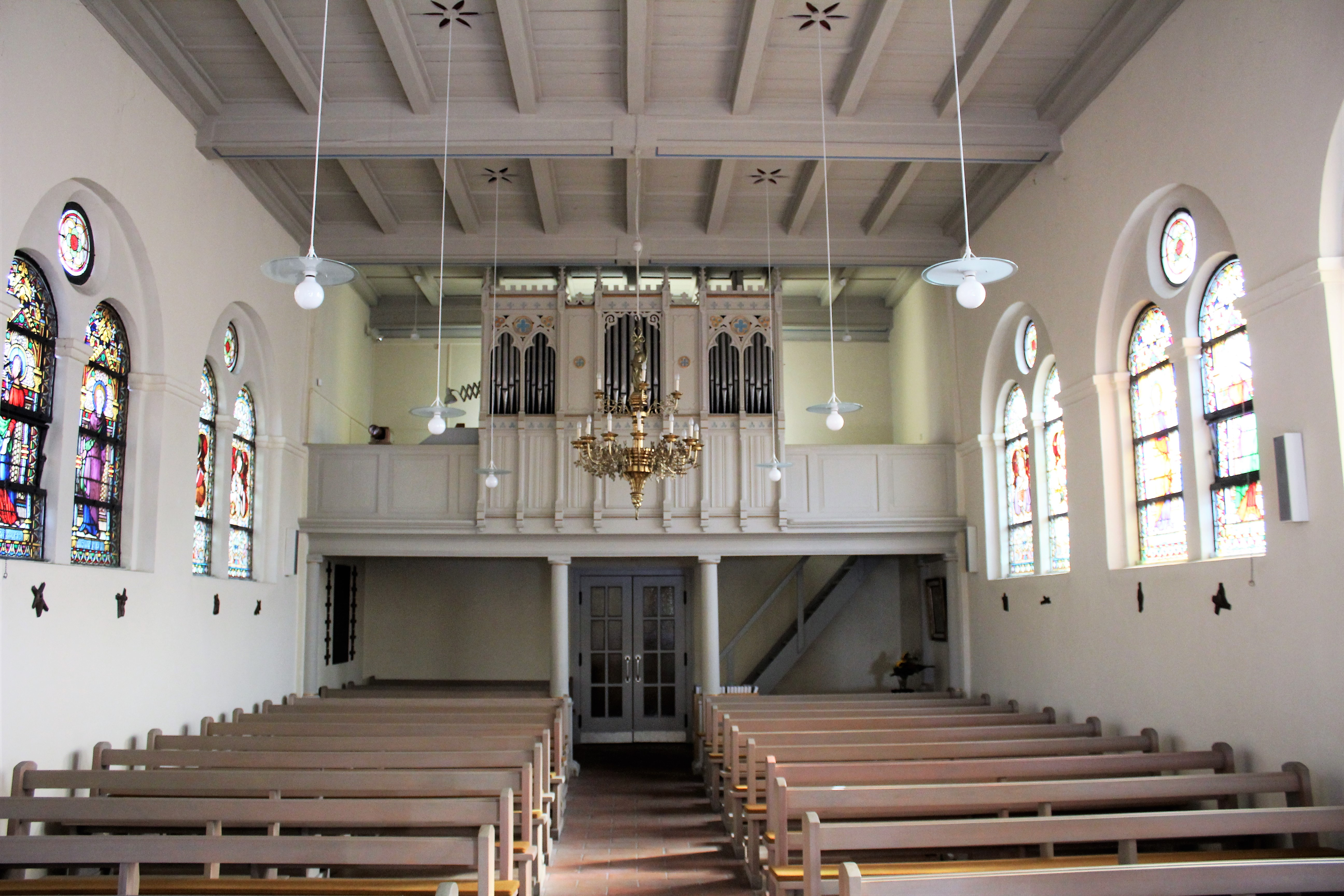 Katholische Kirche St. Joseph in Weener, Landkreis Leer, Ostfriesland, Deutschland